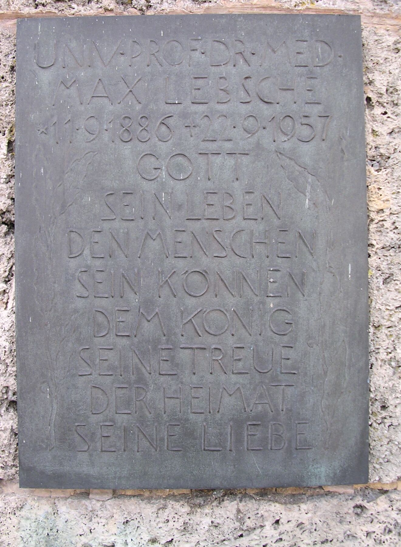 Gedenktafel für Max Lebsche links vom Marienbrunnen in Glonn, Oberbayern/Deutschland